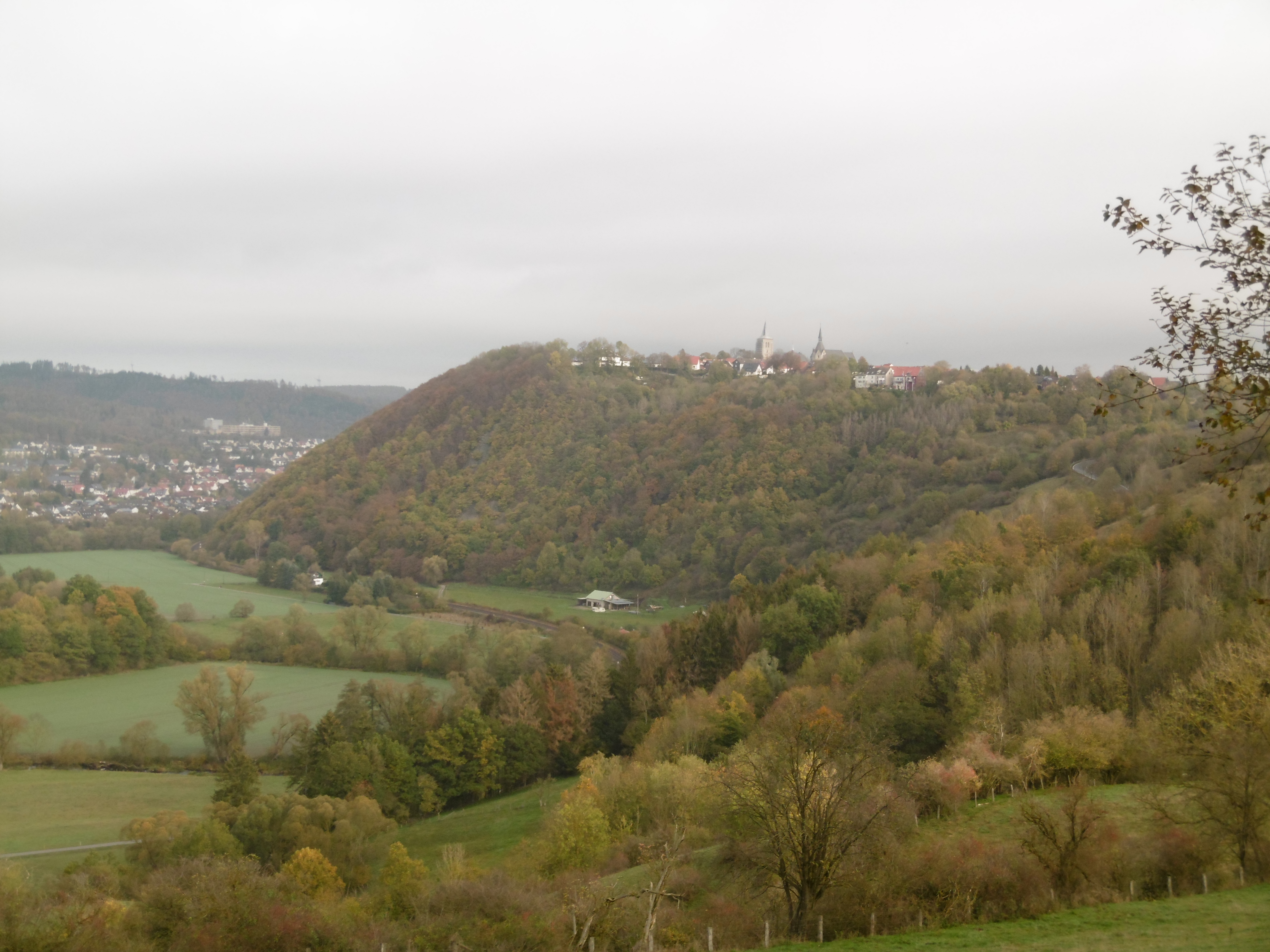 Naturschutzgebiet Hagen / Königsseite mit Obermarsberg darüber; links Naturschutzgebiet Unteres Diemeltal; hinten Niedermarsberg; im Vordergrund Teil vom NSG Auf der Wiemeke.